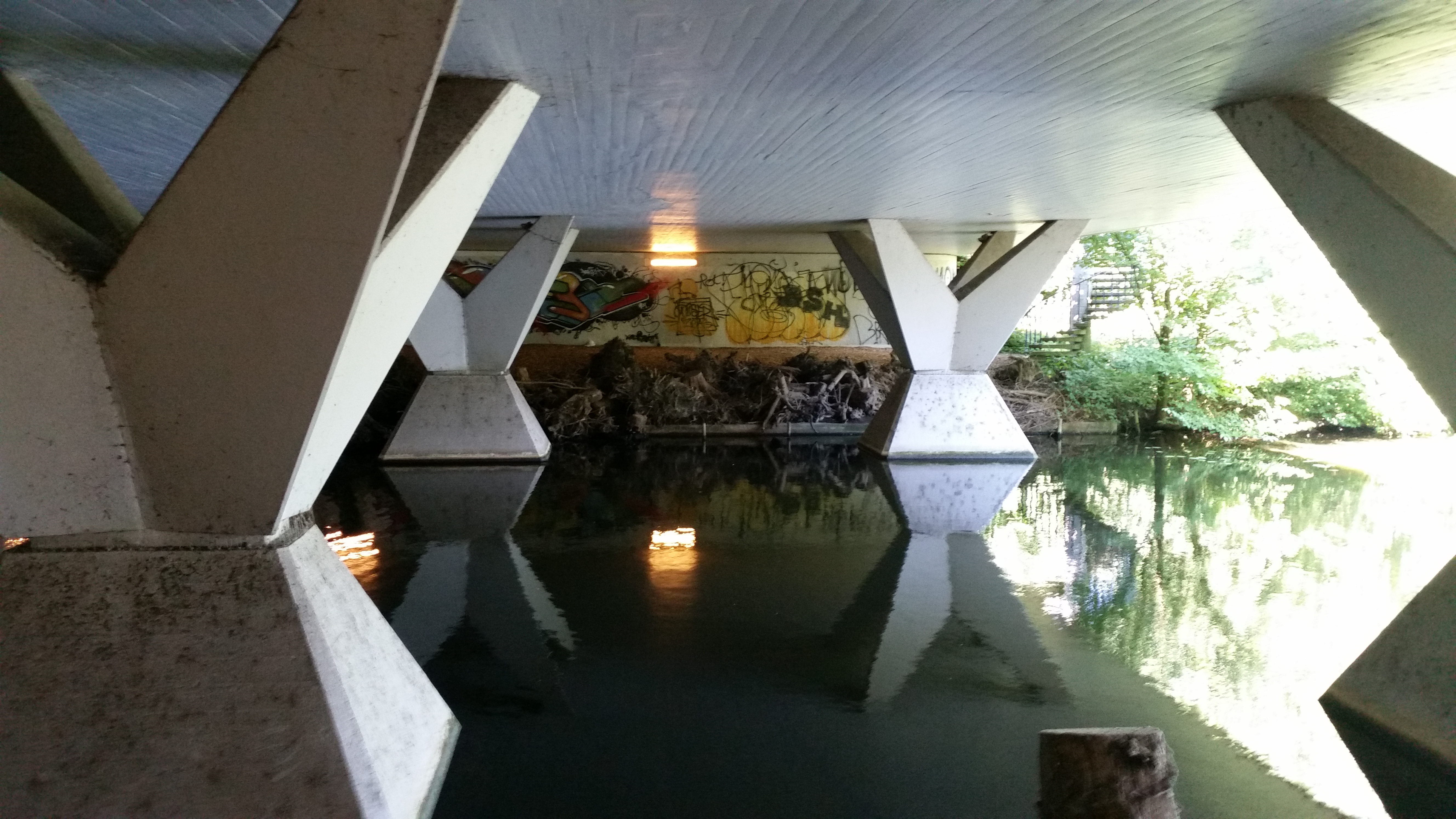 Brug 719 (in Amsterdam); pijlers staand in het water